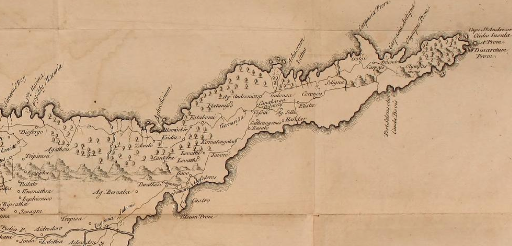 Karte des Karpas, des Nordostens Zyperns